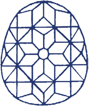 Tracé des 55 facettes telles qu'elles figurent sur l'une des deux faces du diamant le Beau Sancy. D'après le relevé donné par Thomas Cletscher dans sa description des joyaux de la Maison d'Orange vers 1645.